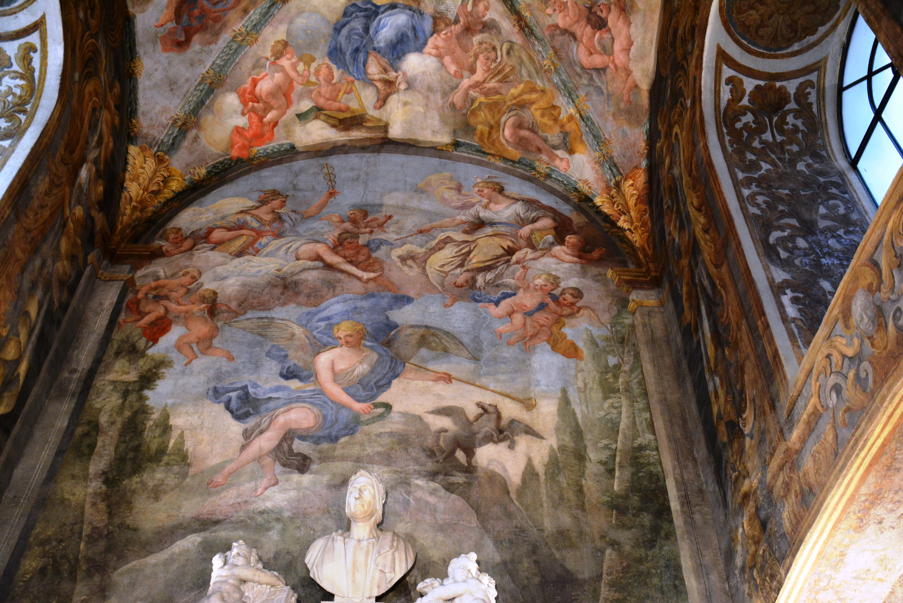 Chiesa di Santa Maria del Parto a Mergellina, a Napoli